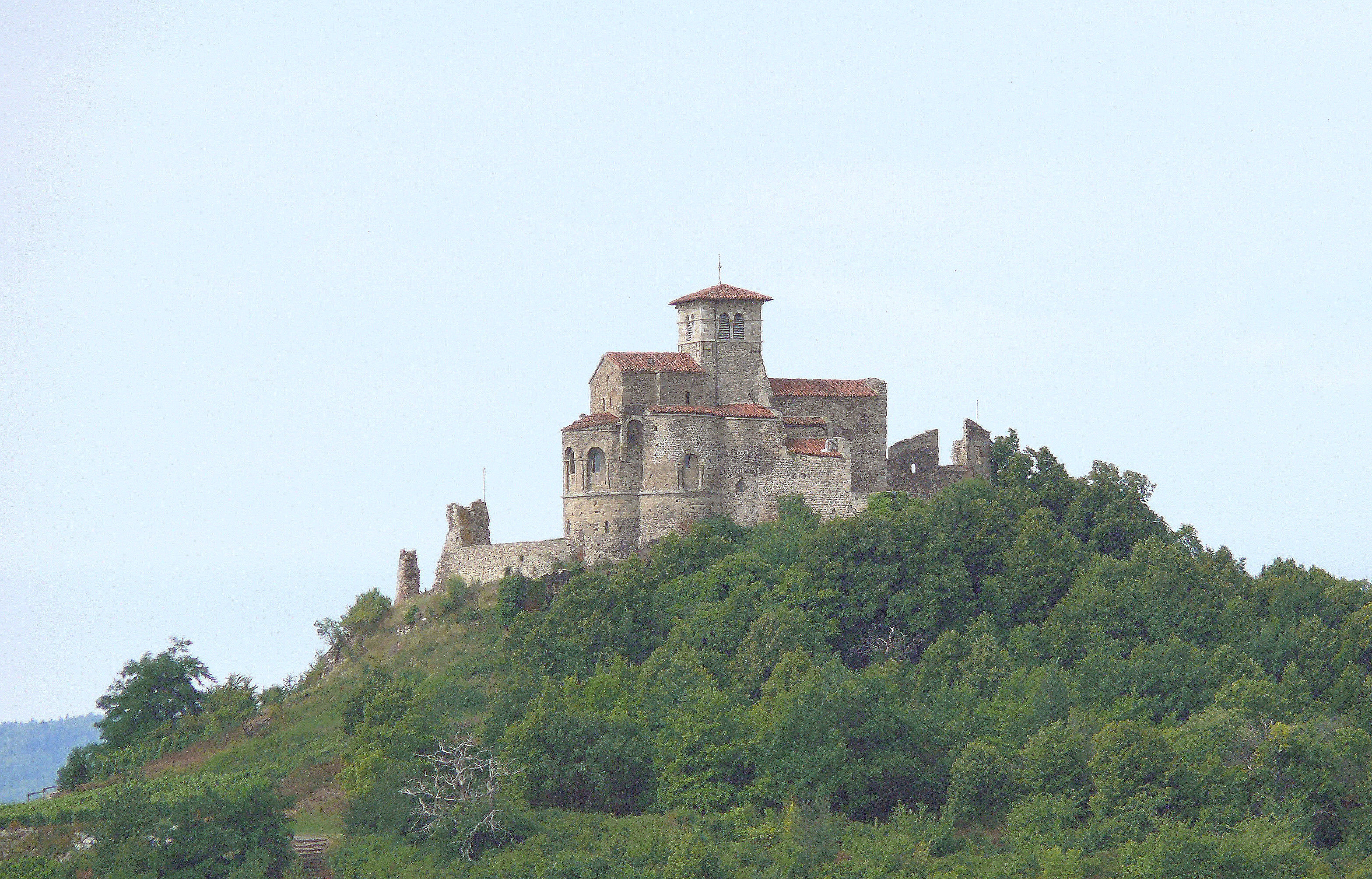 Saint-Romain-le-Puy - Eglise du prieuré